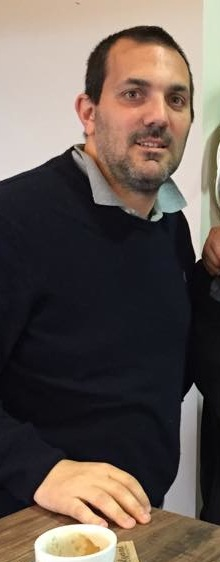 Massimo Margiotta, ex calciatore italovenezuelano